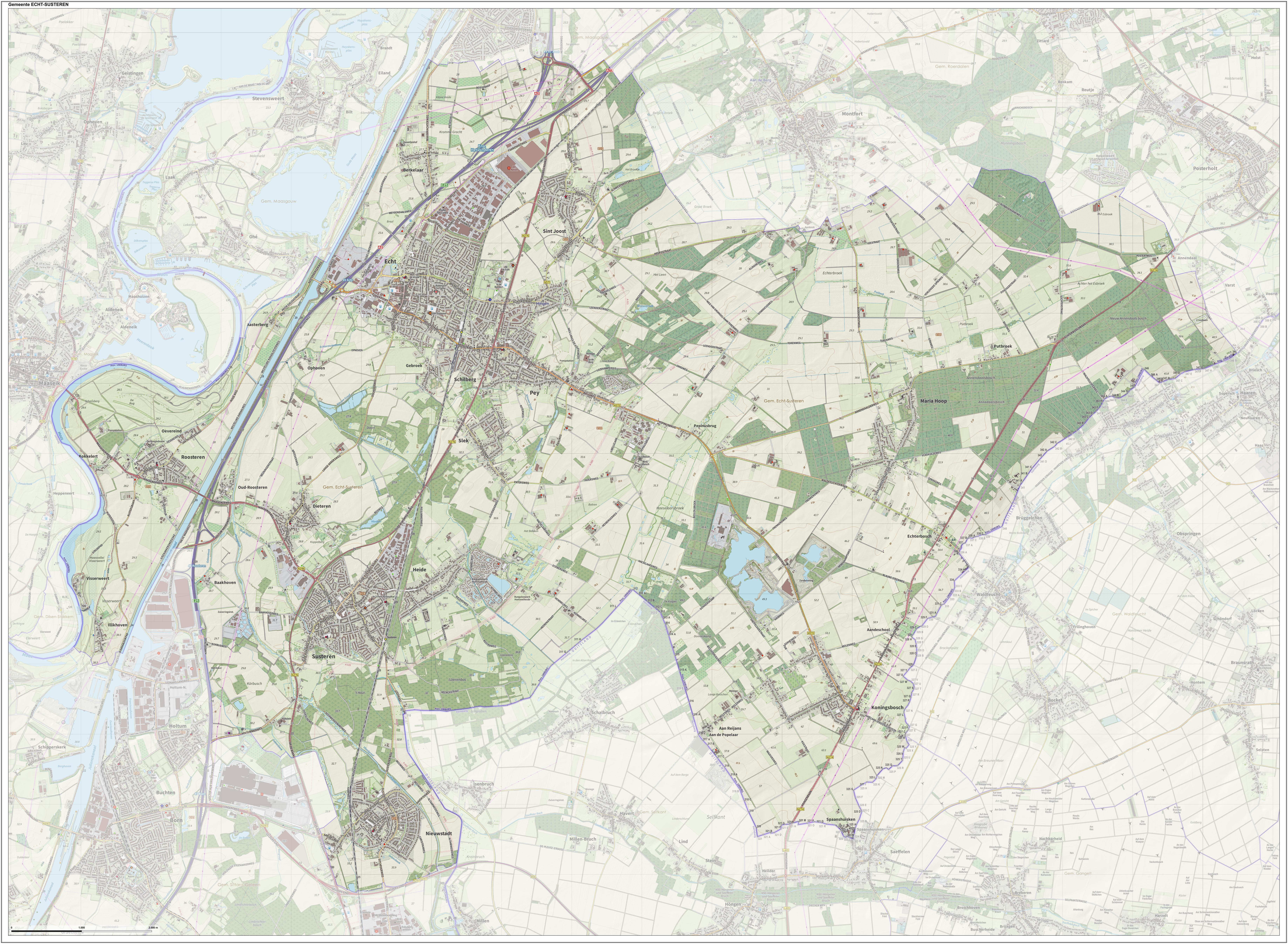 Topografische gemeentekaart. Resolutie: 400 pixels/km. Kaartbeeld samengesteld uit de open geodata van de Top10NL en Top25namen (Kadaster), Creative Commons-BY licentie. Gebouwvlakken uit open geodata BAG extract. Wegen uit de OpenStreetMap, OpenStreetMap community. Reliëfschaduw uit de Actuele Hoogtekaart AHN2. Samenstelling en kleurenschema: Jan-Willem van Aalst, met QGIS. Zie ook de Legenda.